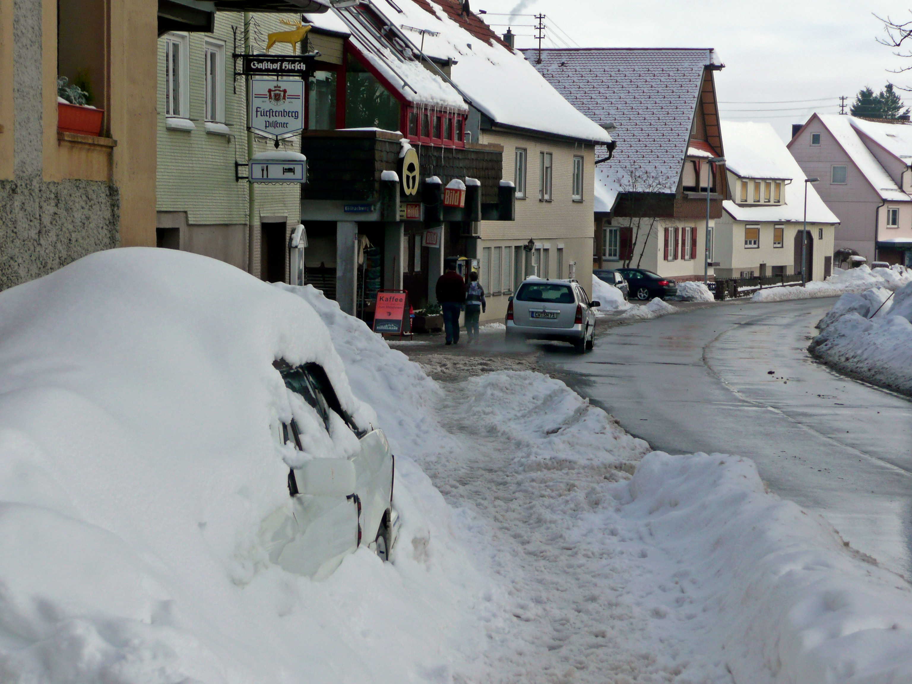 Verschneites Auto mit Postfiliale Bäckerei Hanselmann Filiale